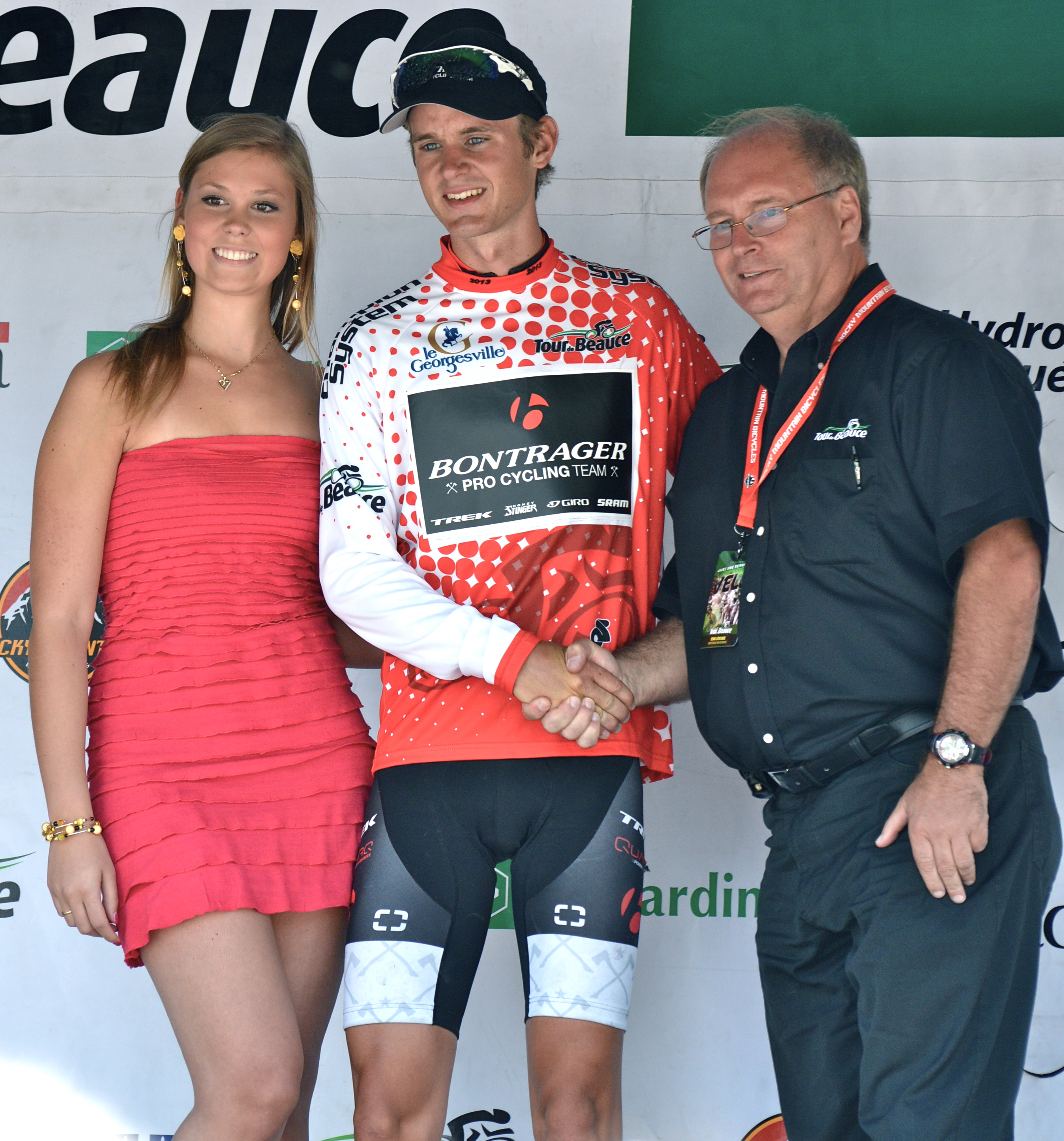 Nathan Brown, après la cinquième étape du Tour de Beauce 2013, disputée le 15 juin 2012 à Québec. Il porte le maillot rouge attribué au meilleur jeune. Le lendemain, après la sixième et dernière étape, il sera le vainqueur du Tour.